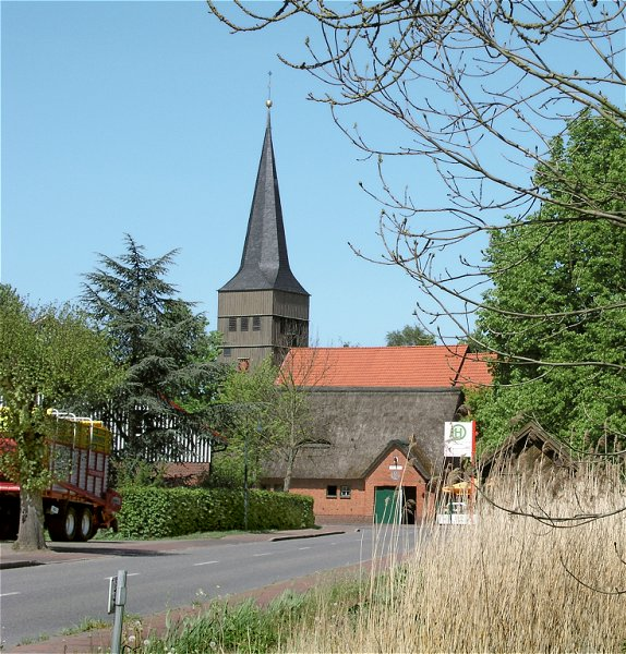 Haselau Dorfzentrum - Center of the Village of Haselau - Schleswig-Holstein - Germany